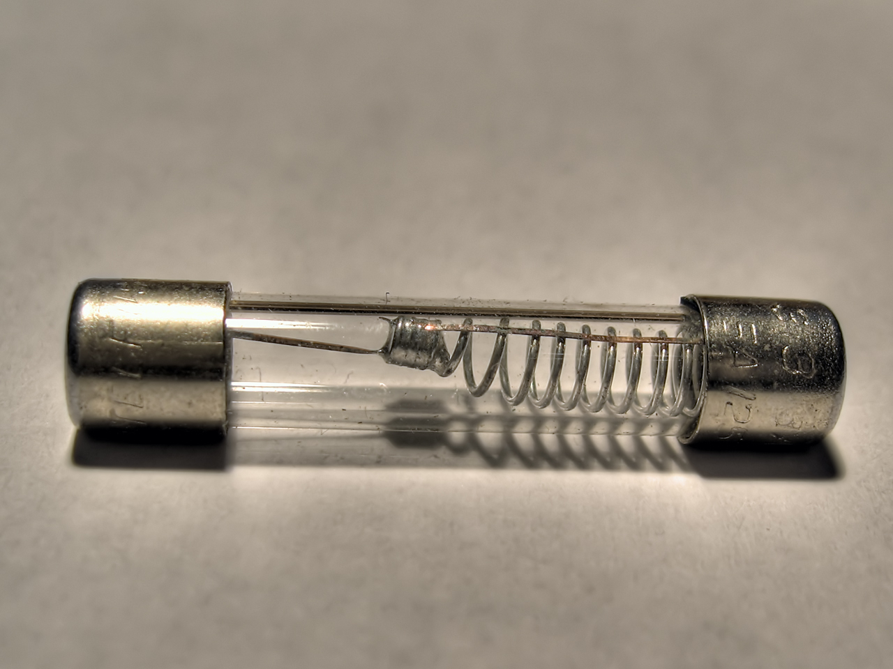 Fuse